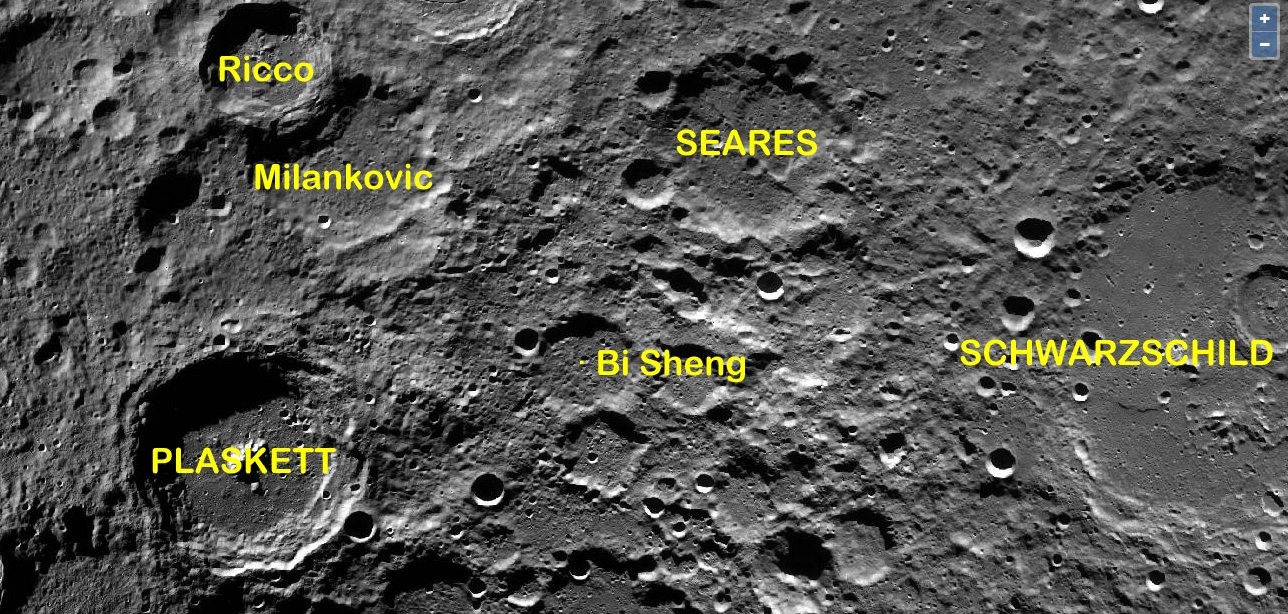 Cráter lunar Bi Sheng. Localización (Imagen LRO)